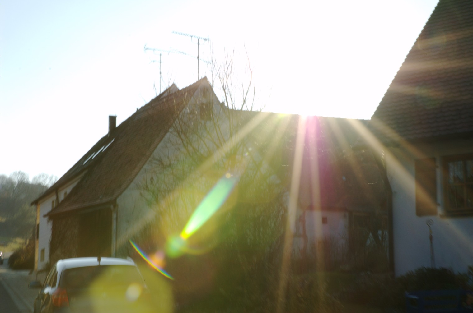 Adelmannssitz (mit Lensflare)